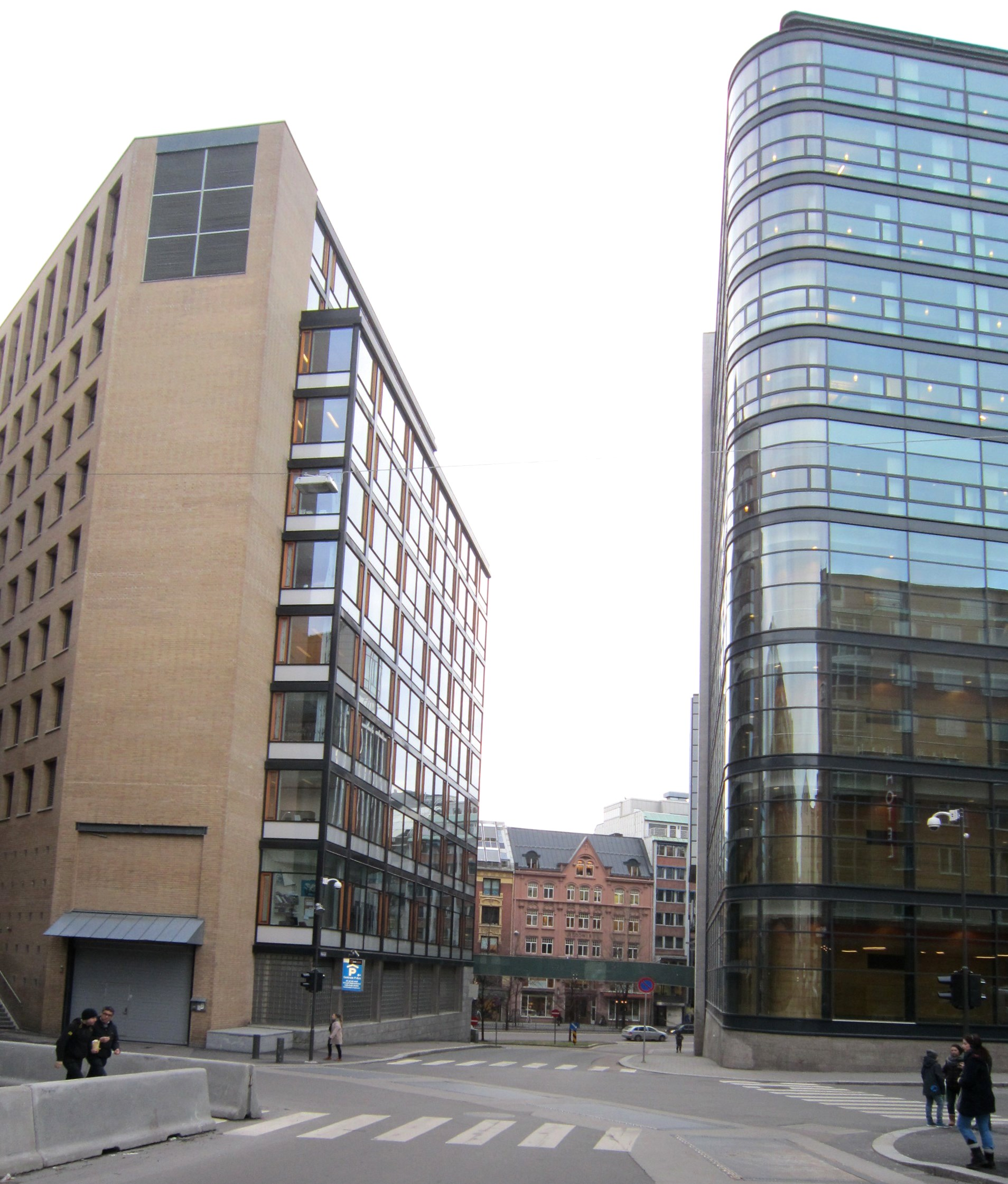 Keysers gate mot Pilestredet